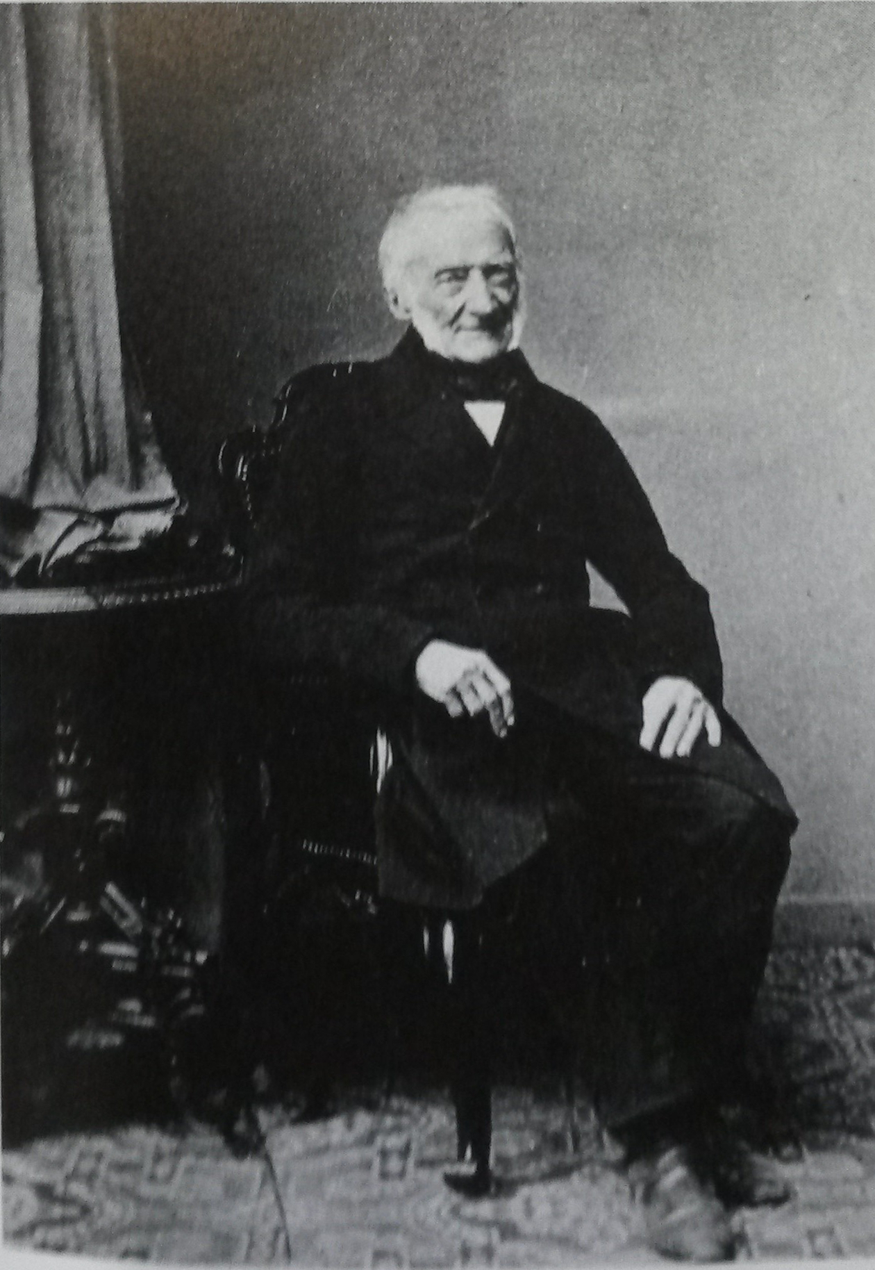 Friedrich Philipp Usener (* 26. November 1773 in Steinfurth; † 11. November 1867 in Frankfurt am Main), Jurist und Senator